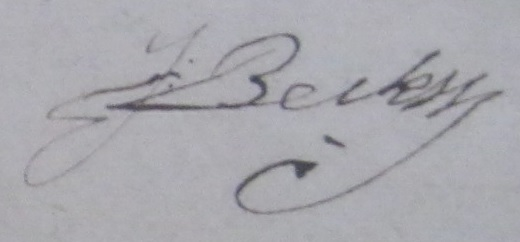 In Heeresgeschichtles Museum Wenen